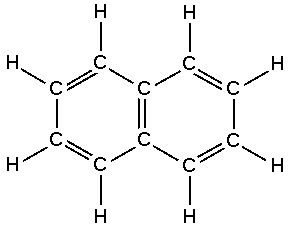 from meta